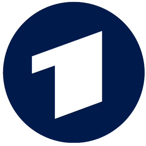 Das neue Cornerlogo